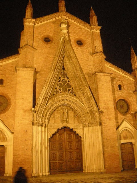 Chieri: vista notturna della facciata del Duomo, o chiesa collegiata di Santa Maria della Scala.